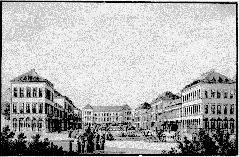 Dresden